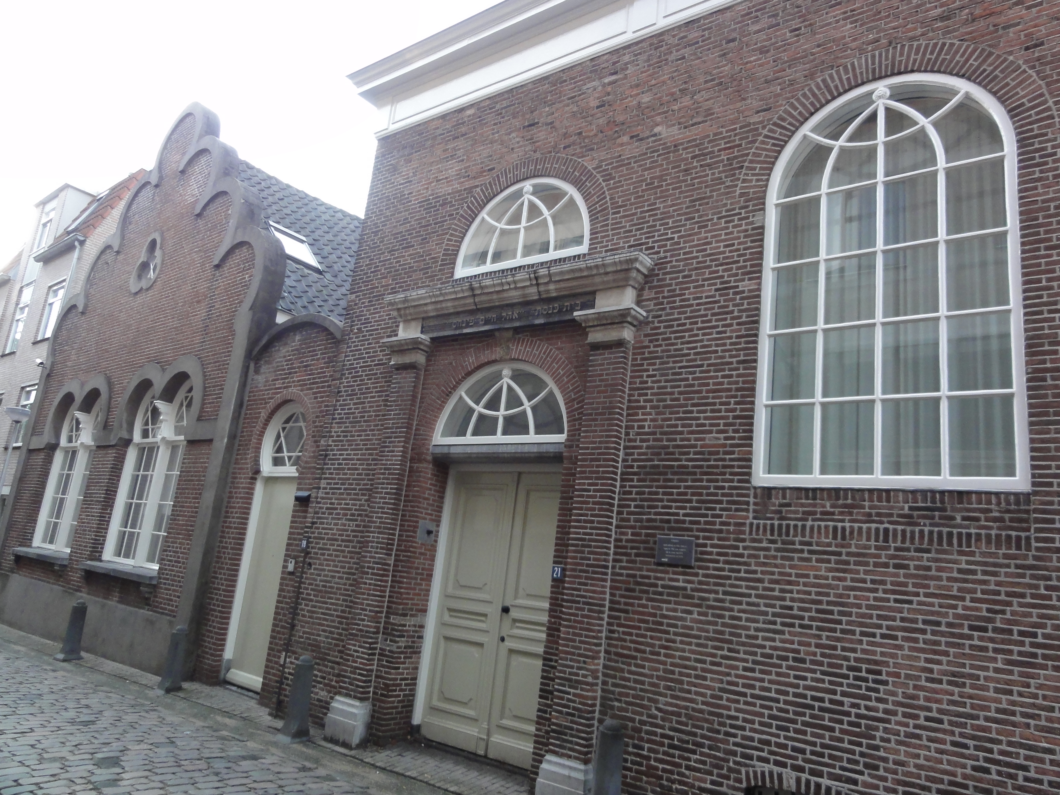 Nijmegen Rijksmonument 31157 Joodse school en synagoge 72″ N, 5° 51′ 48.3″ E Object location51° 50′ 56.39″ N, 5° 51′ 48.59″ E